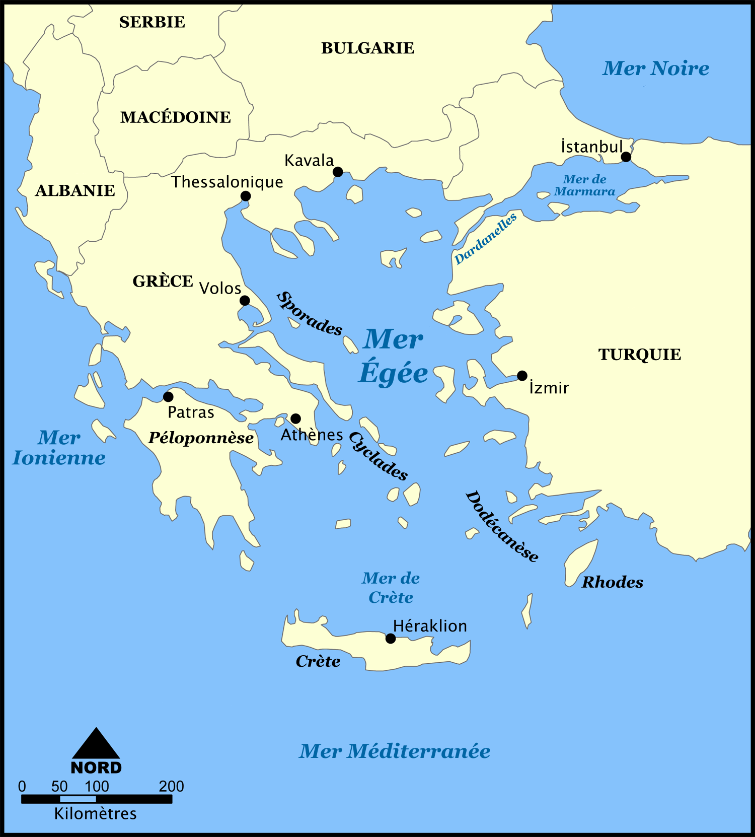 Carte de la mer Égée avec ses principales villes côtières.